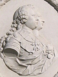 Triumphpforte in Innsbruck (Maria Ludovica und Erzherzog Leopold)